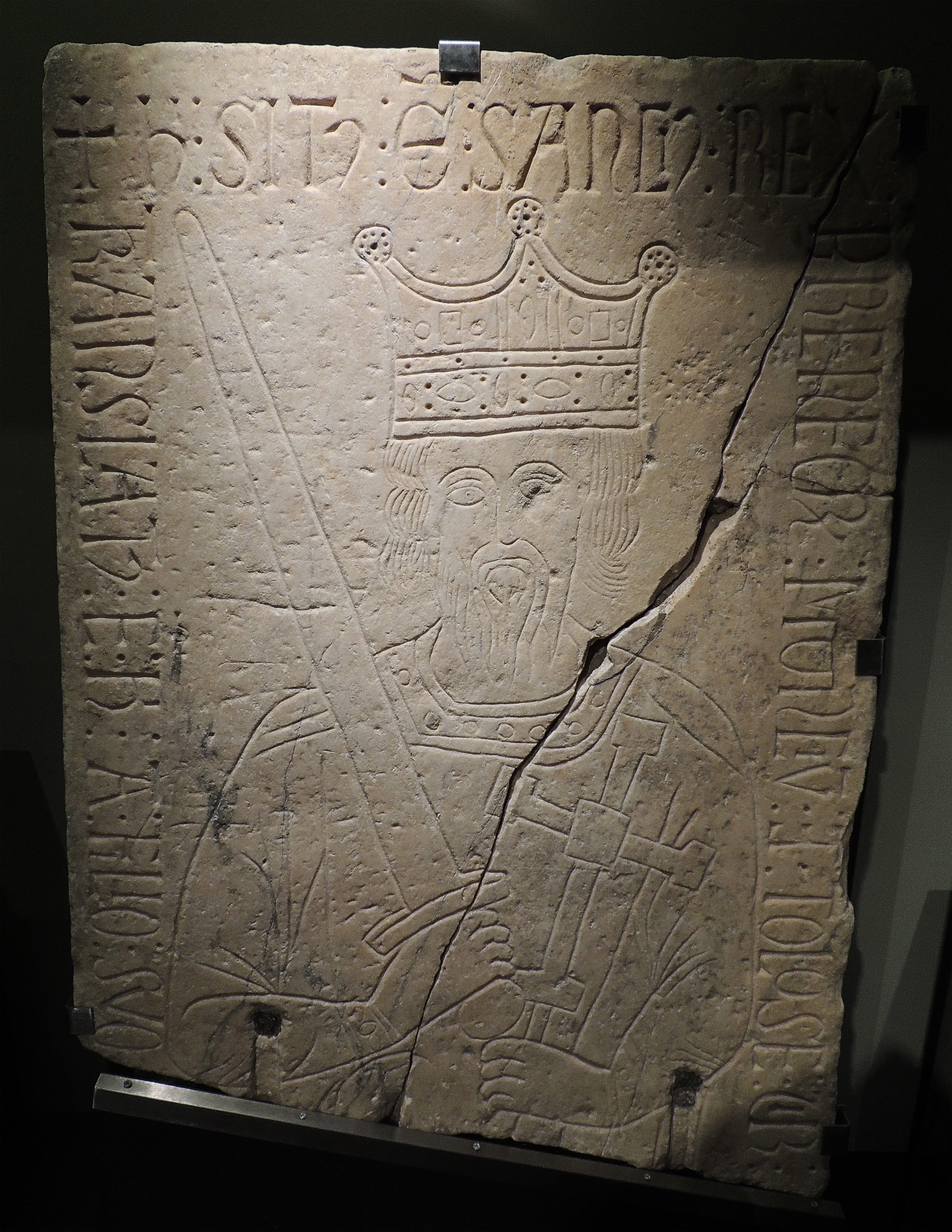 Lápida de Sancho III de Navarra